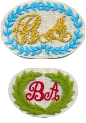 Réplicas de los Escudos de Oficial y tropa de los Regimientos de Patricios en 1810 realizadas por Regimientos de América